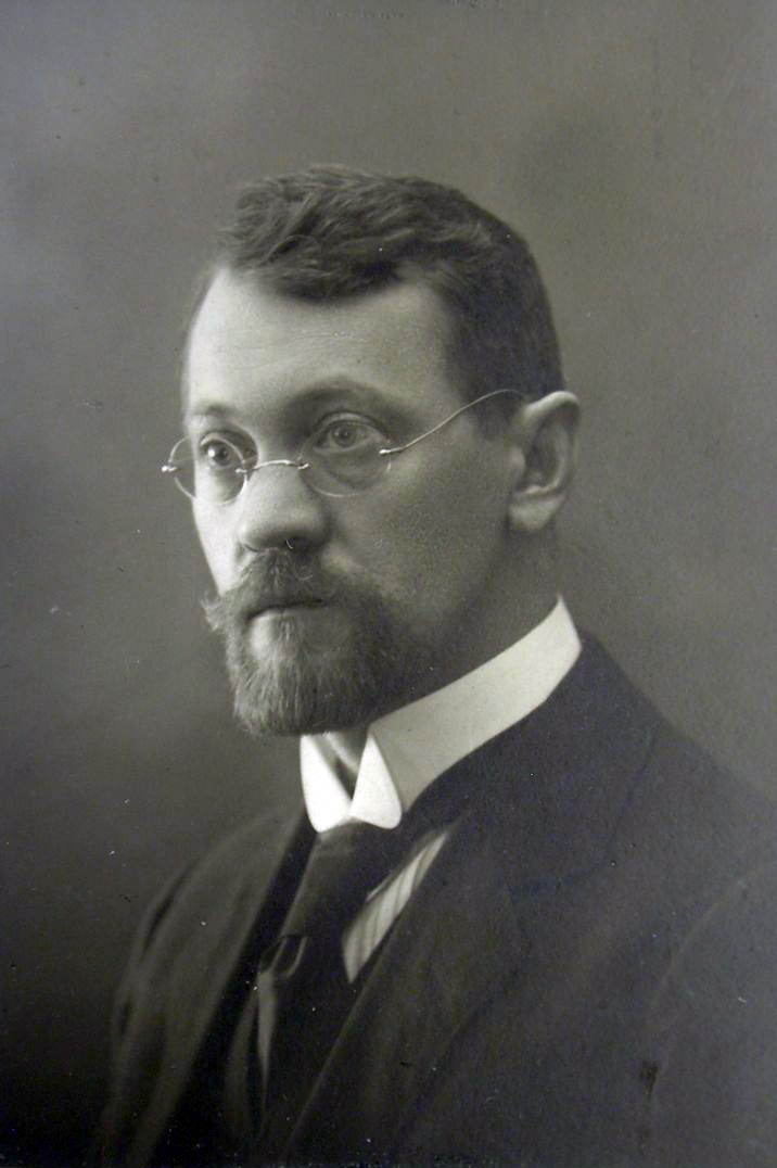 Et studiobilde av den norske geolog og forsker Adolf Hoel som nyutnevnt stipendiat ved Universitetet i Oslo fra 1911.